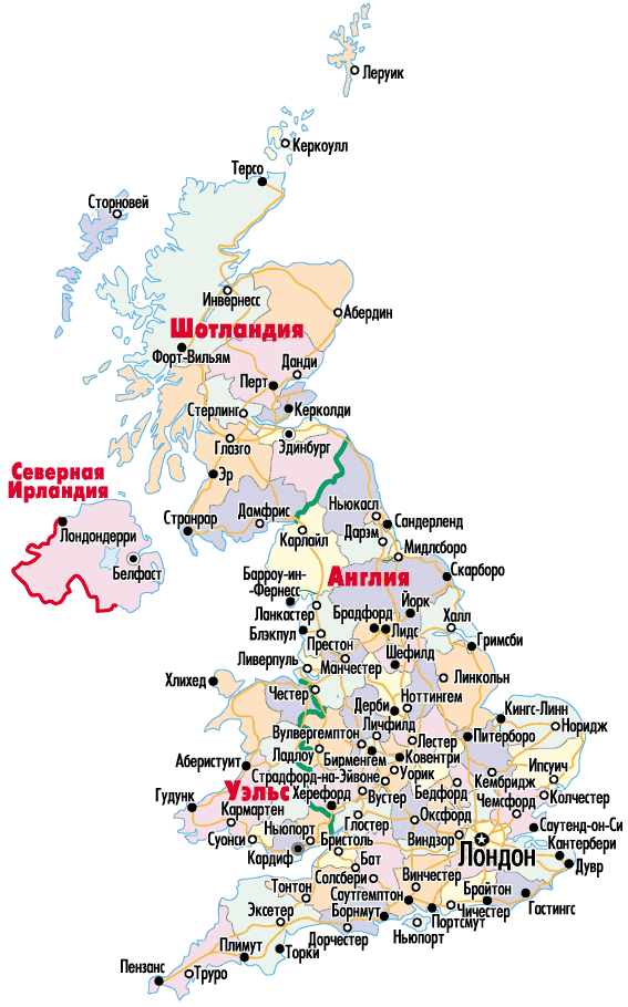 Крупные города Соединенного Королевства Великобритании и Северной Ирландии